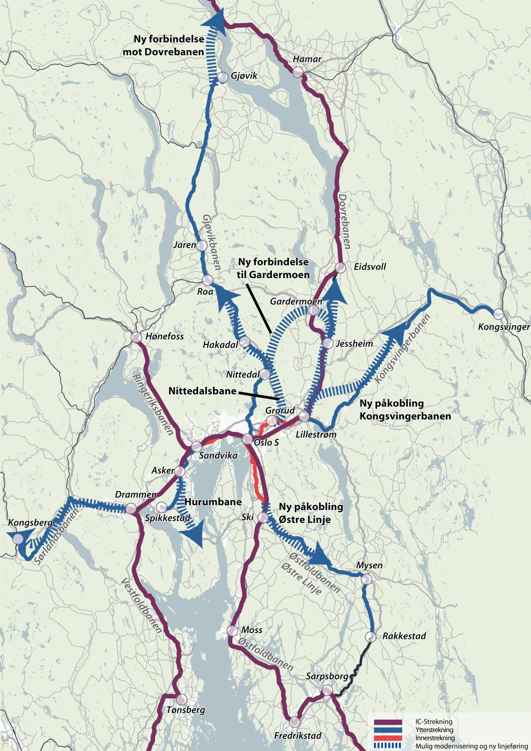 Utviklingsmuligheter for regiontog i Østlandsområdet, fra KVU Oslonavet